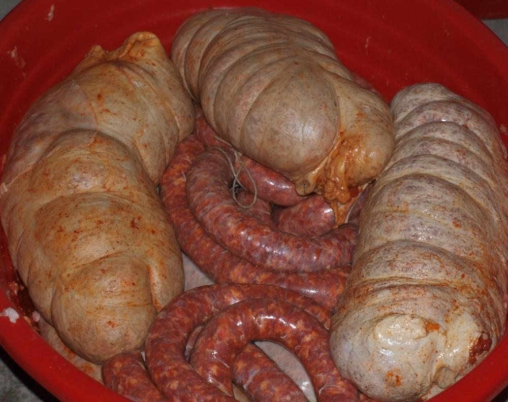 Slavonski kulin nakon nadivanja.